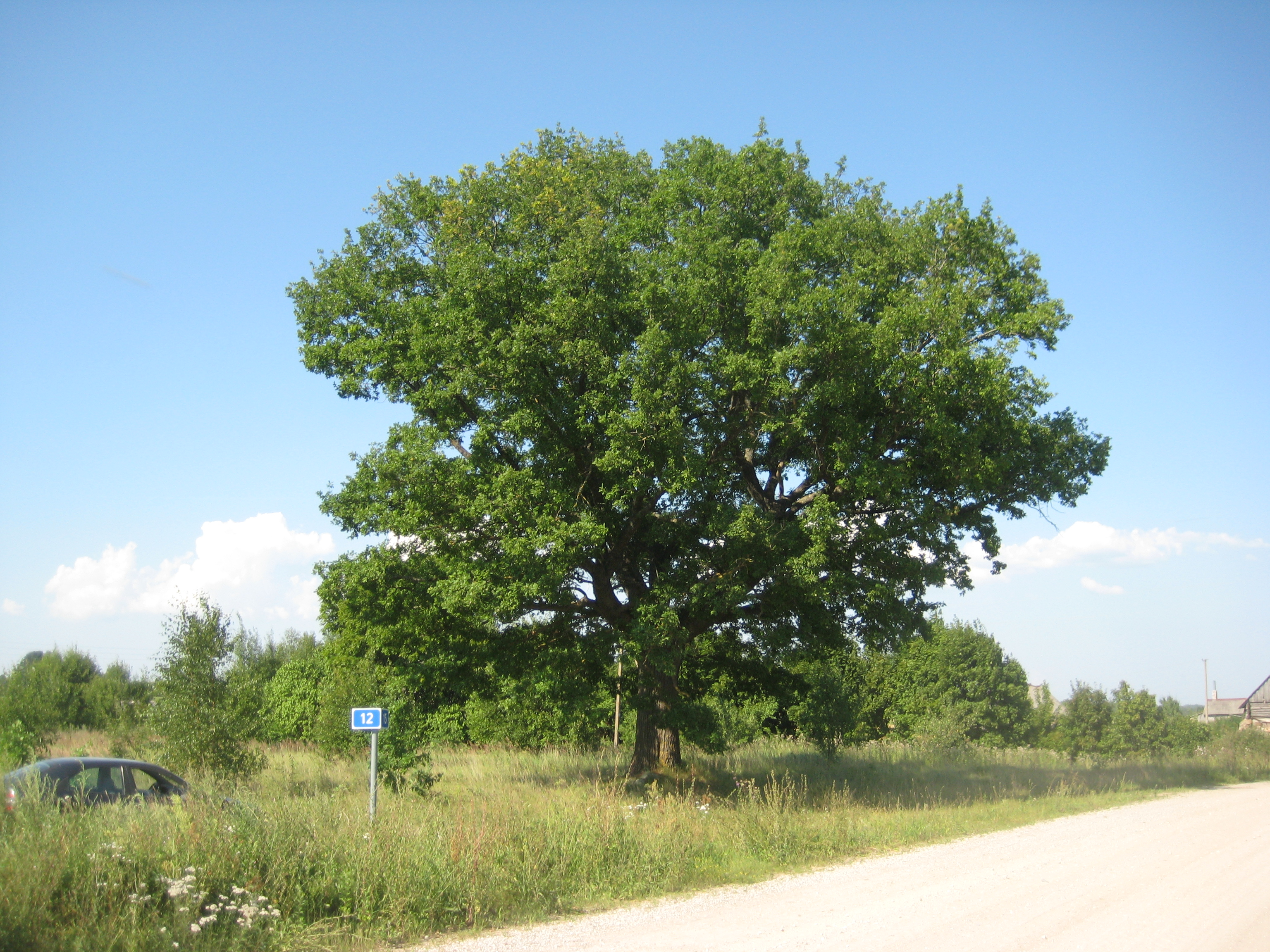 Suvieko sen., Lithuania